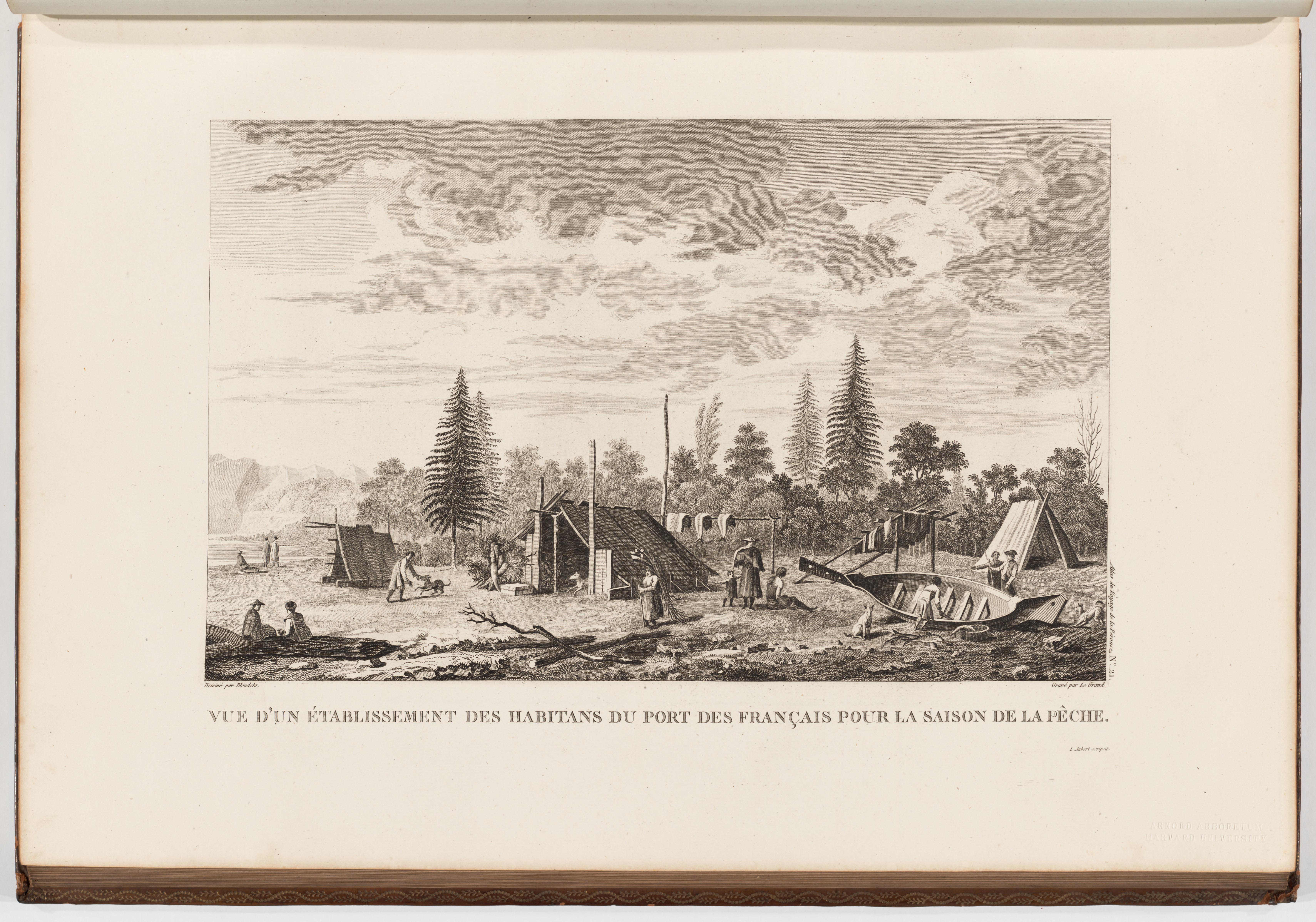 Lapérouse en Alaska : Port-des-Français (Baie Lituya). Voyage de La Pérouse autour du monde /publié conformément au décret du 22 avril 1791, et rédigé par L.A. Milet-Mureau.